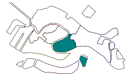 Sestiere di San Marco in Venezia